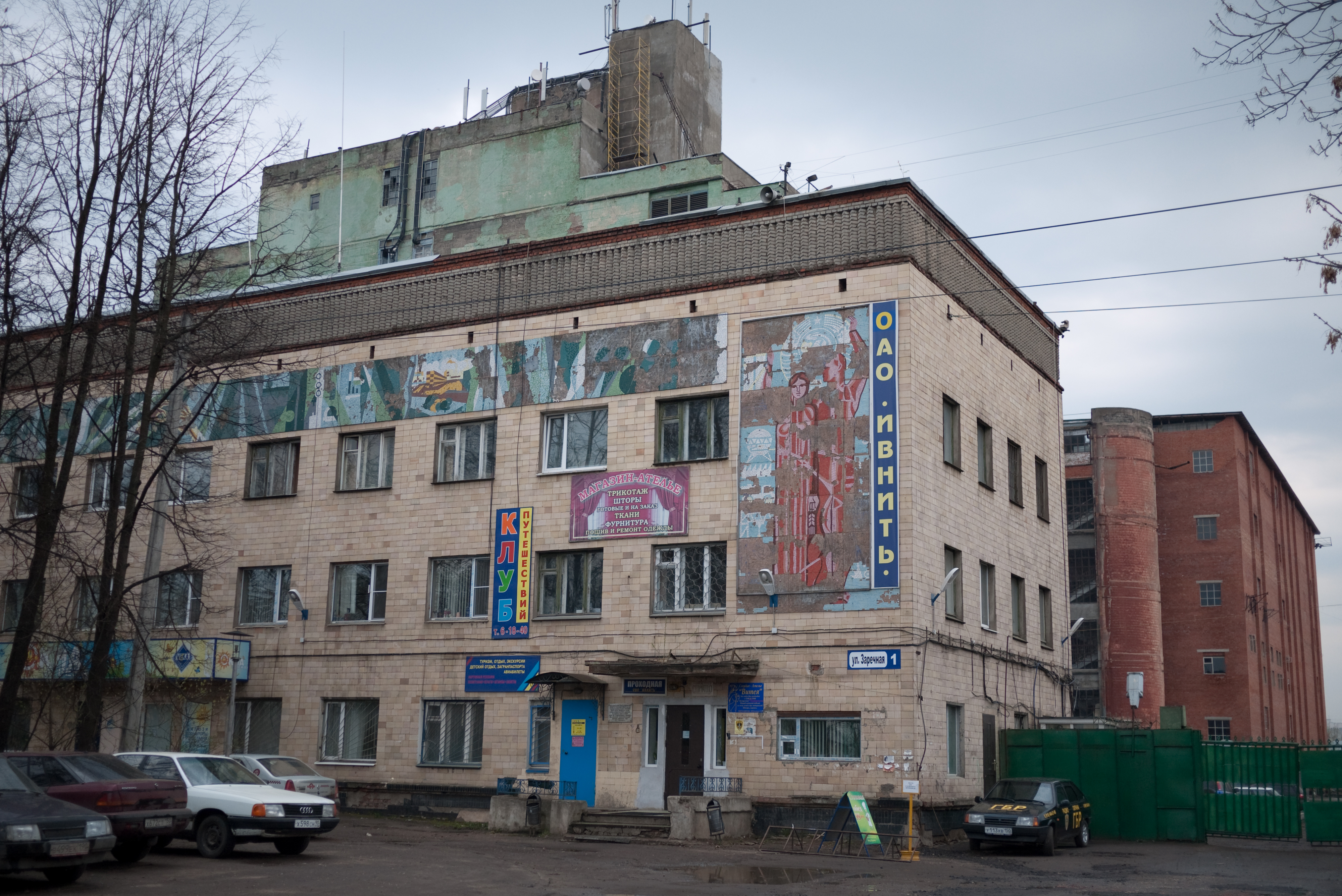 Здание ОАО «Ивнить» в городе Ивантеевка. Бывшая фабрика им. Лукина.